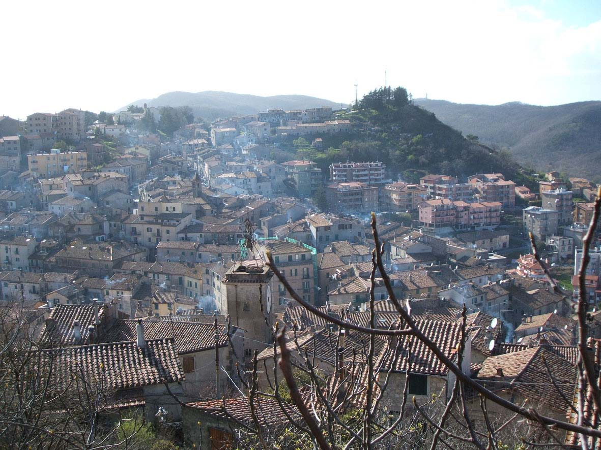 Panorama di Tolfa RM